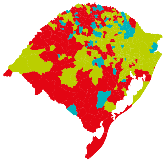 Resultados do primeiro turno da eleição para governador do Rio Grande do Sul em 2014 por cidades.